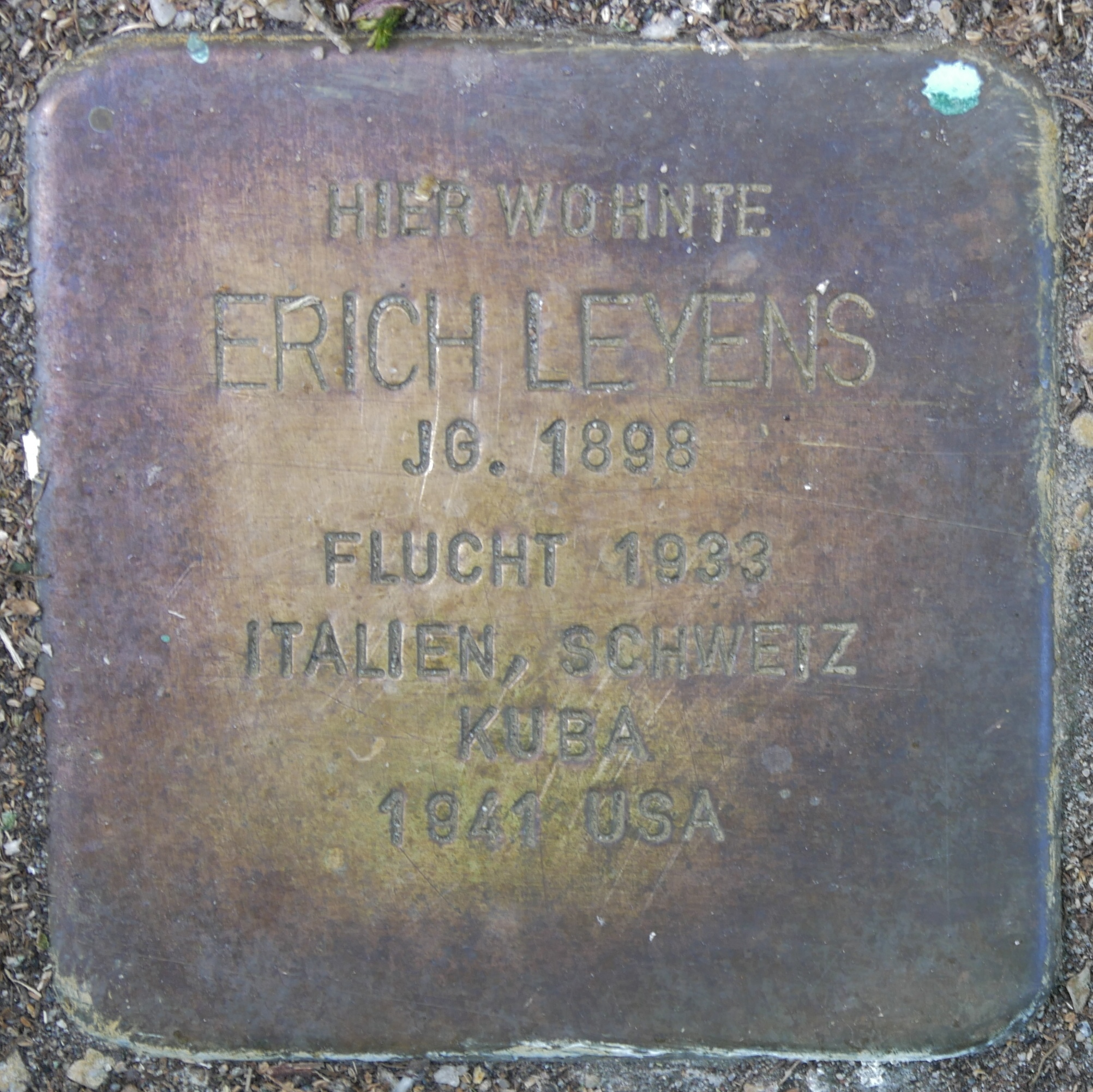 Stolpersteine Wesel: Leyens, Erich